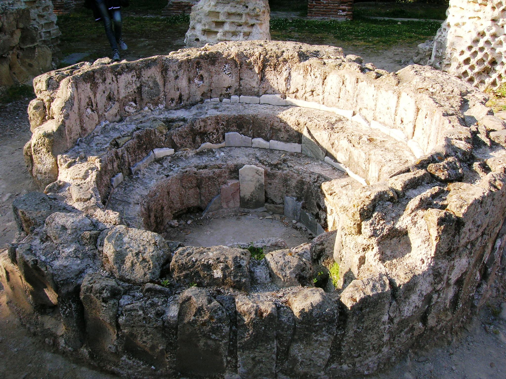 Battistero